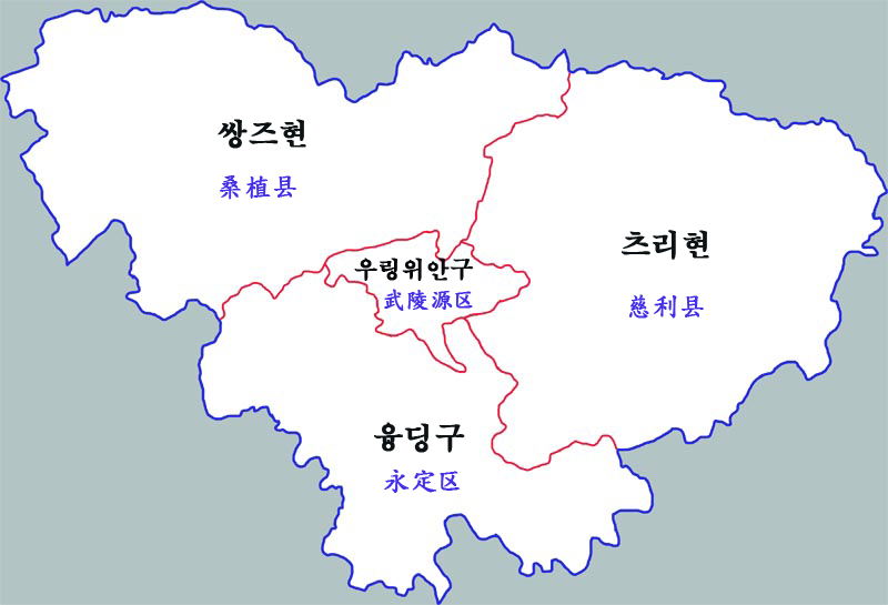 장자제시현급구역도